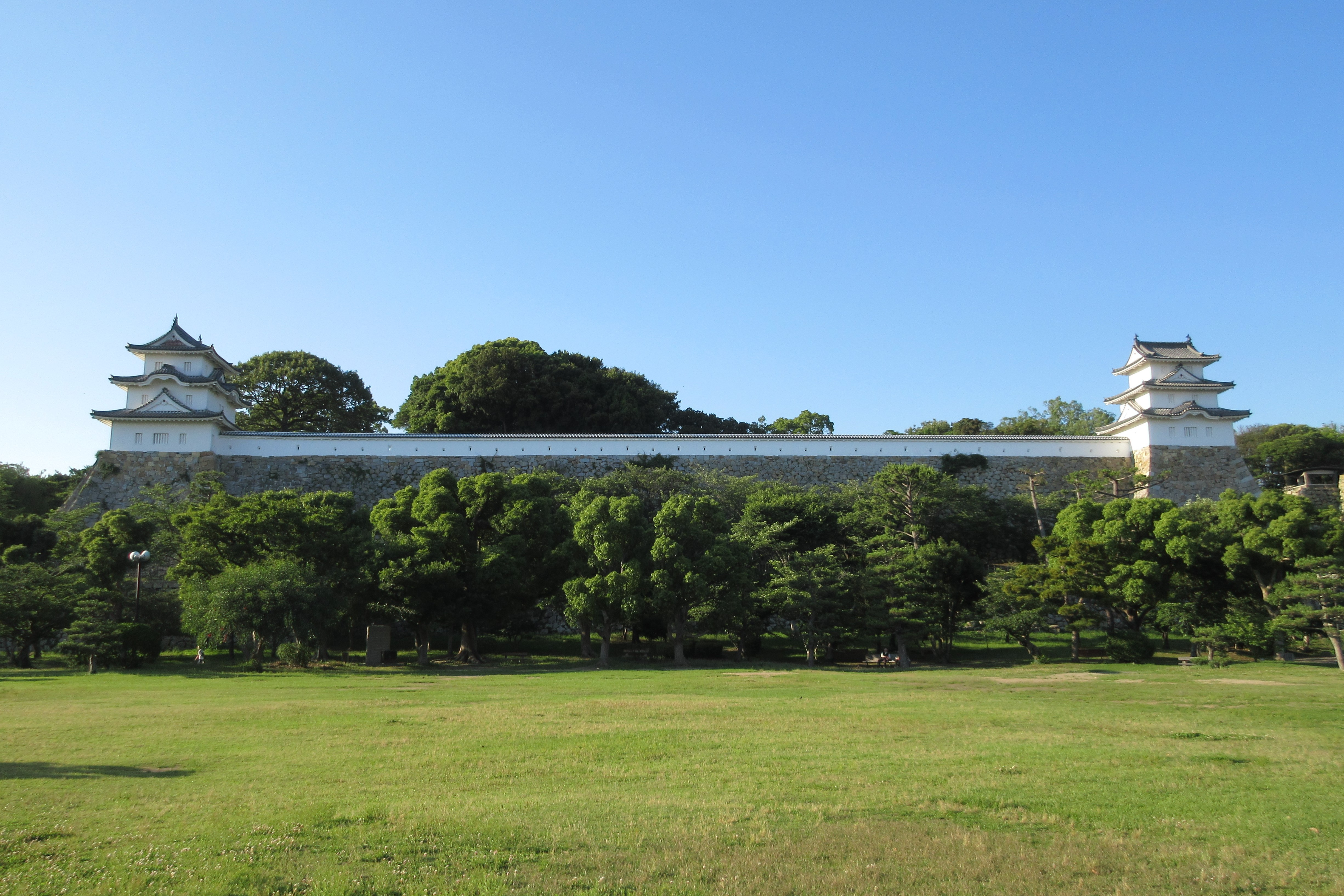 明石城の櫓